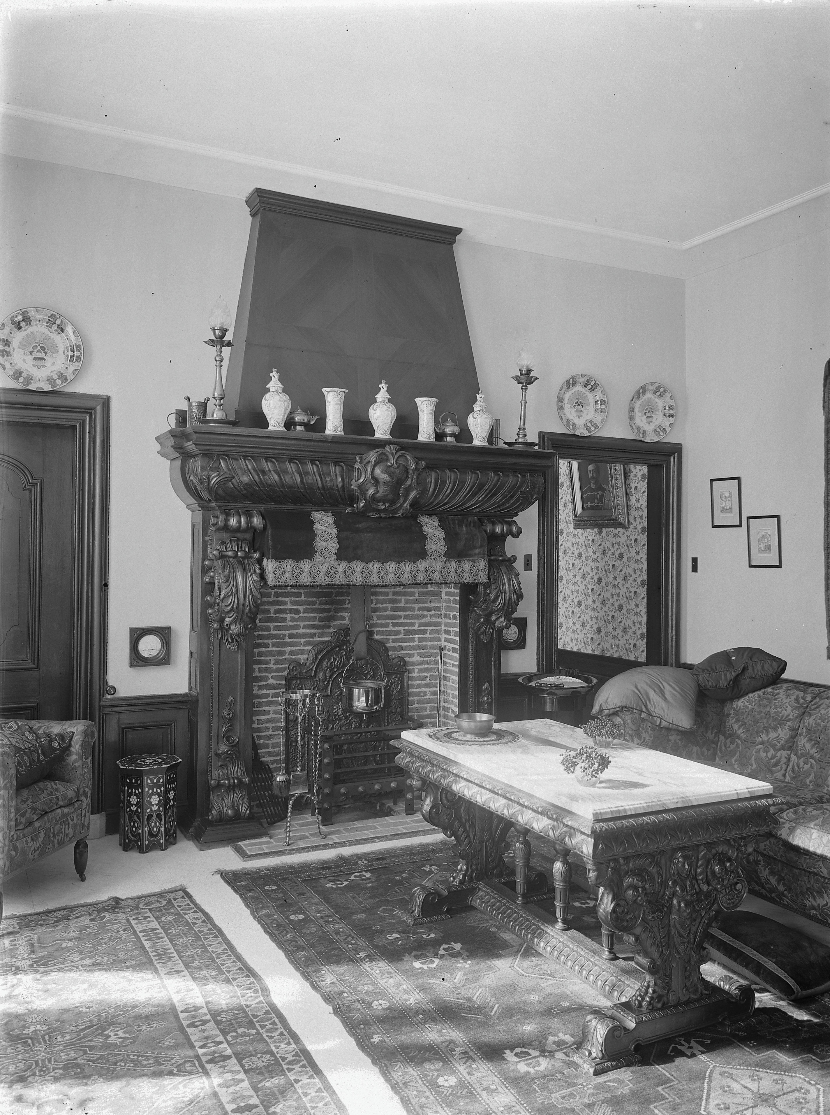 Huis Oosterbeek: Interieur hal